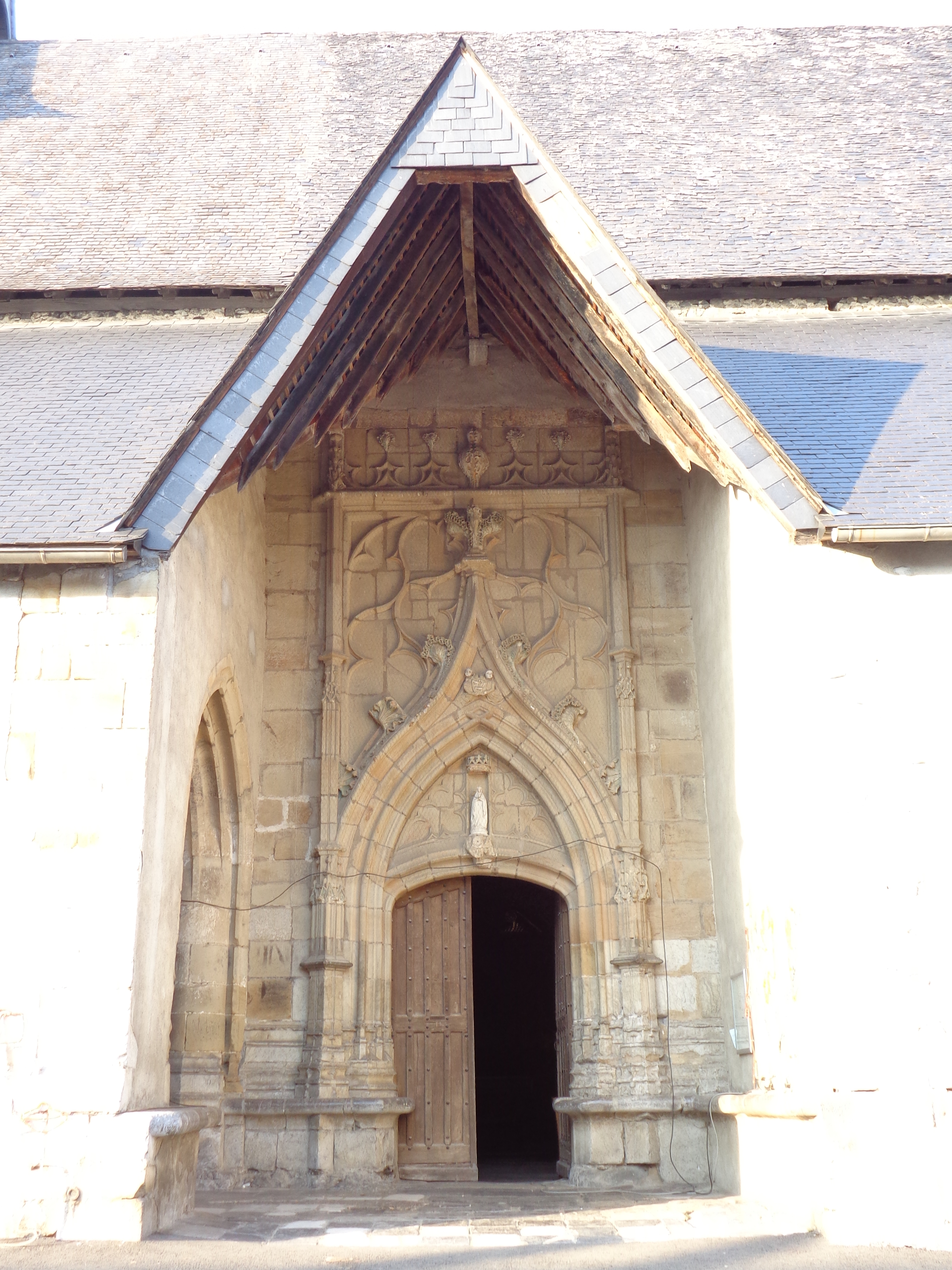 Porche gothique flamboyant (XVIe)